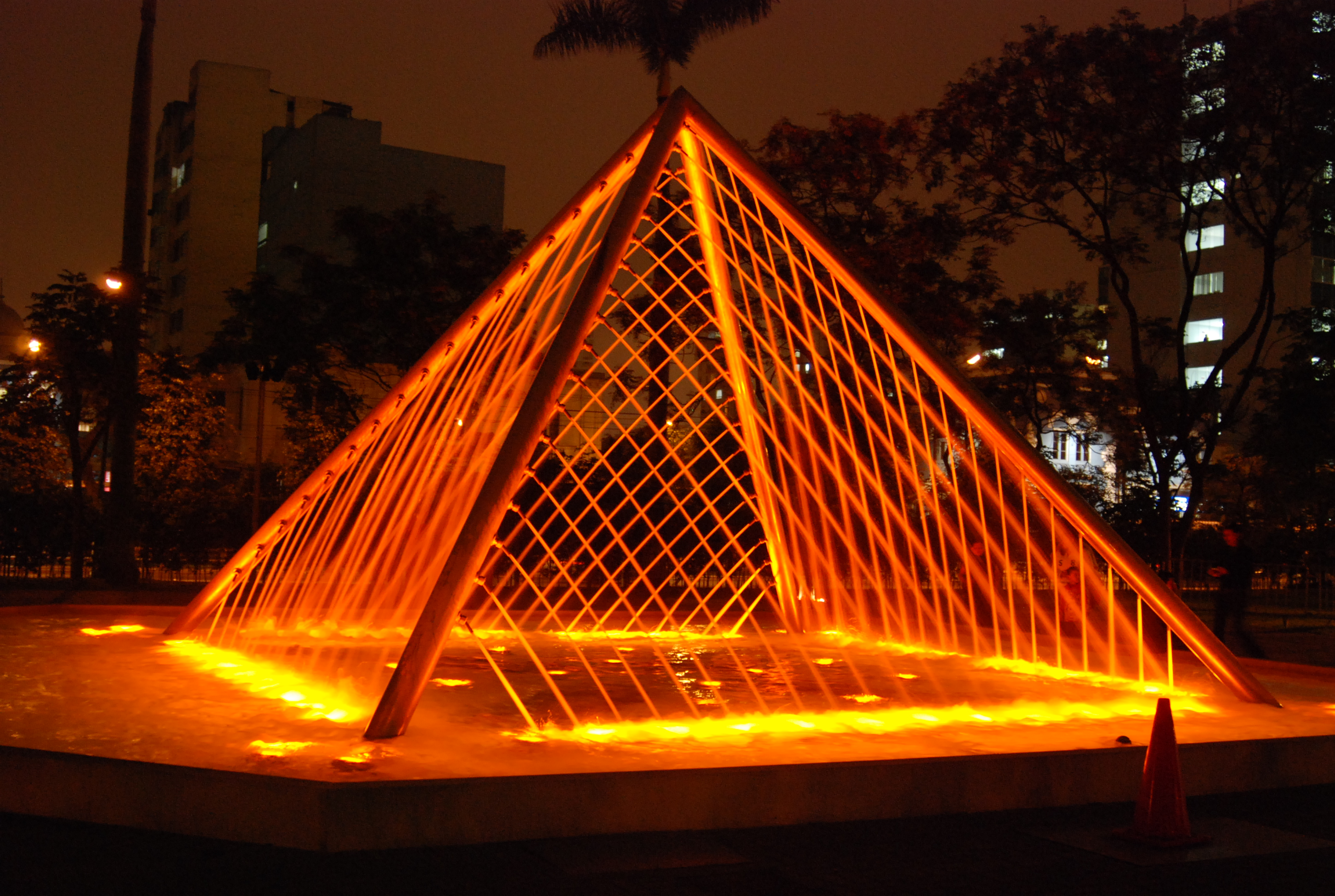 Una fuente del Circuito Mágico del Agua en el Parque de la Reserva en Lima, Perú.